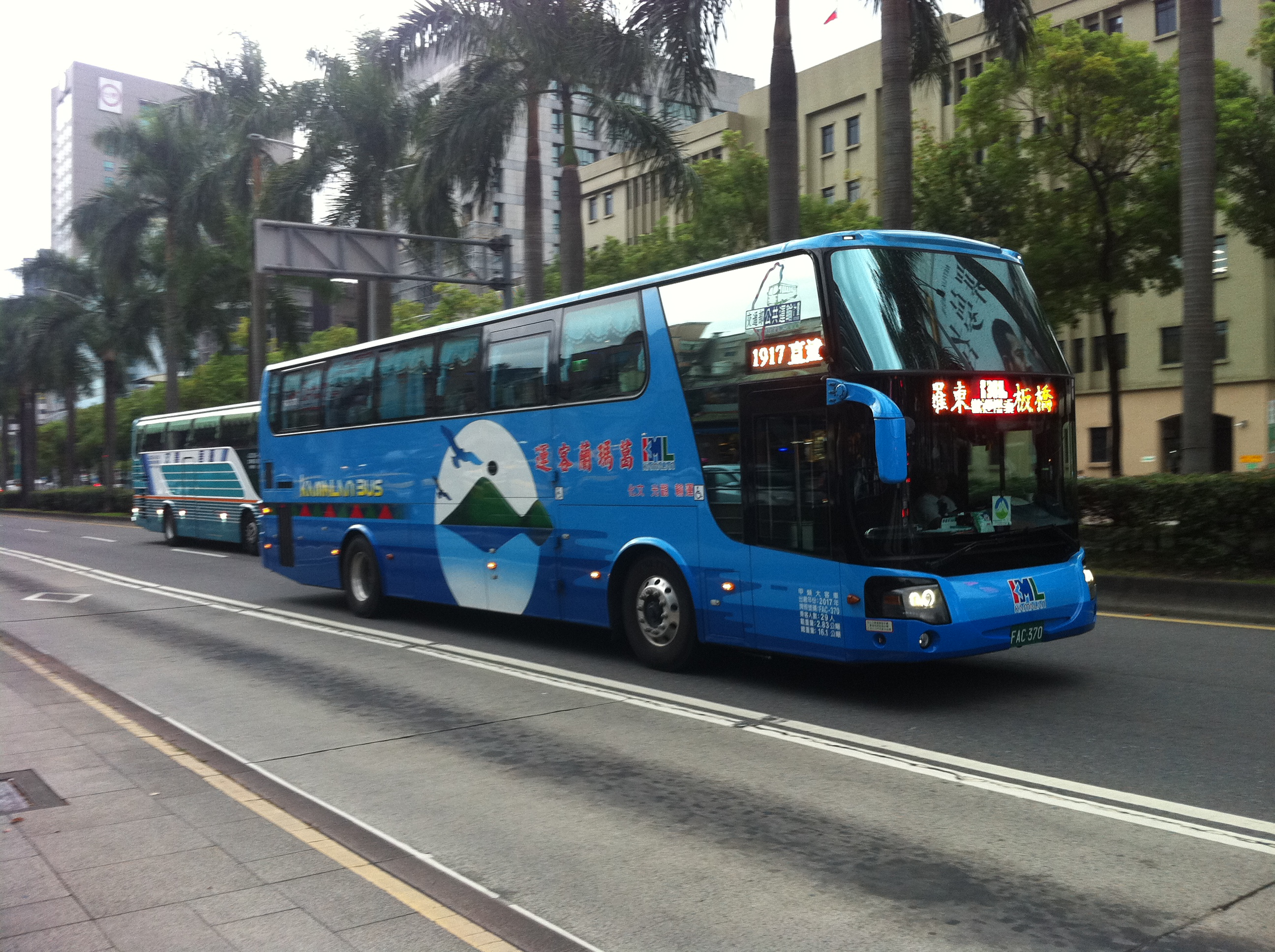 中文（台灣）: 葛瑪蘭客運2017年三菱扶桑大客車FAC-370，行經臺北市中華路一段。